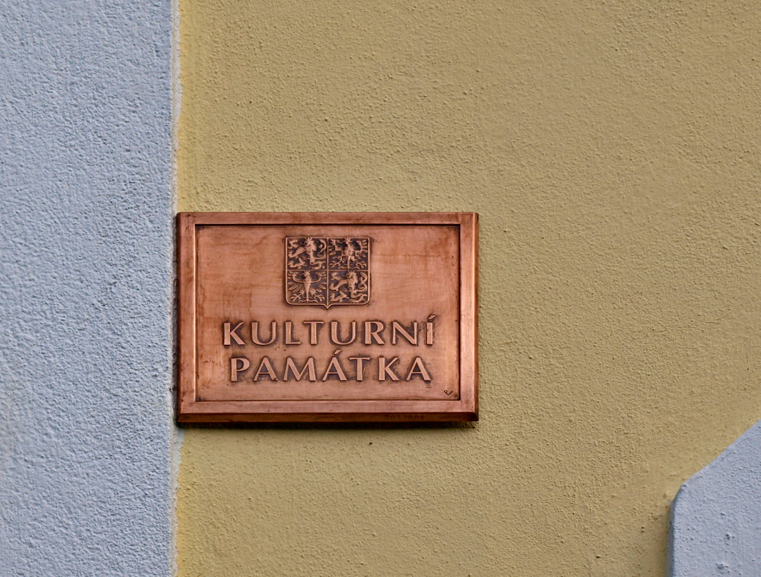 Cedulka Kulturní památka na kostele sv. Jiří ve Vraném n. Vltavou